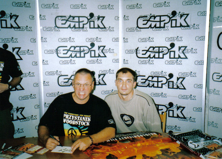 Jerzy Owsiak with a fan.